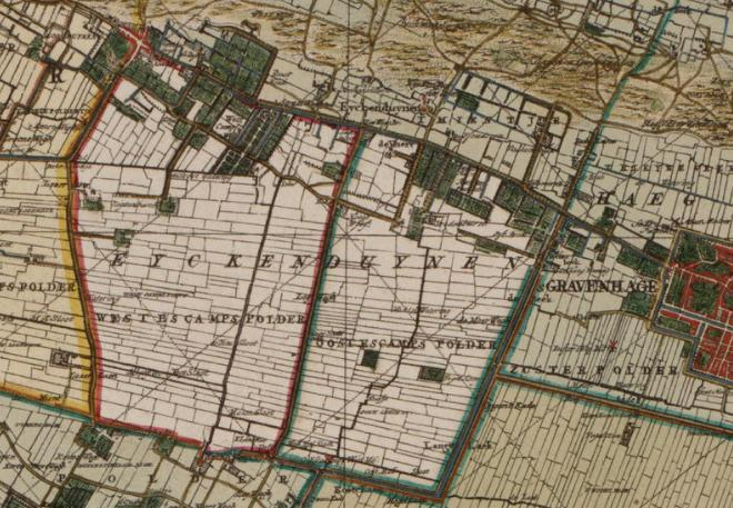 Escamp polders, Loosduinen.